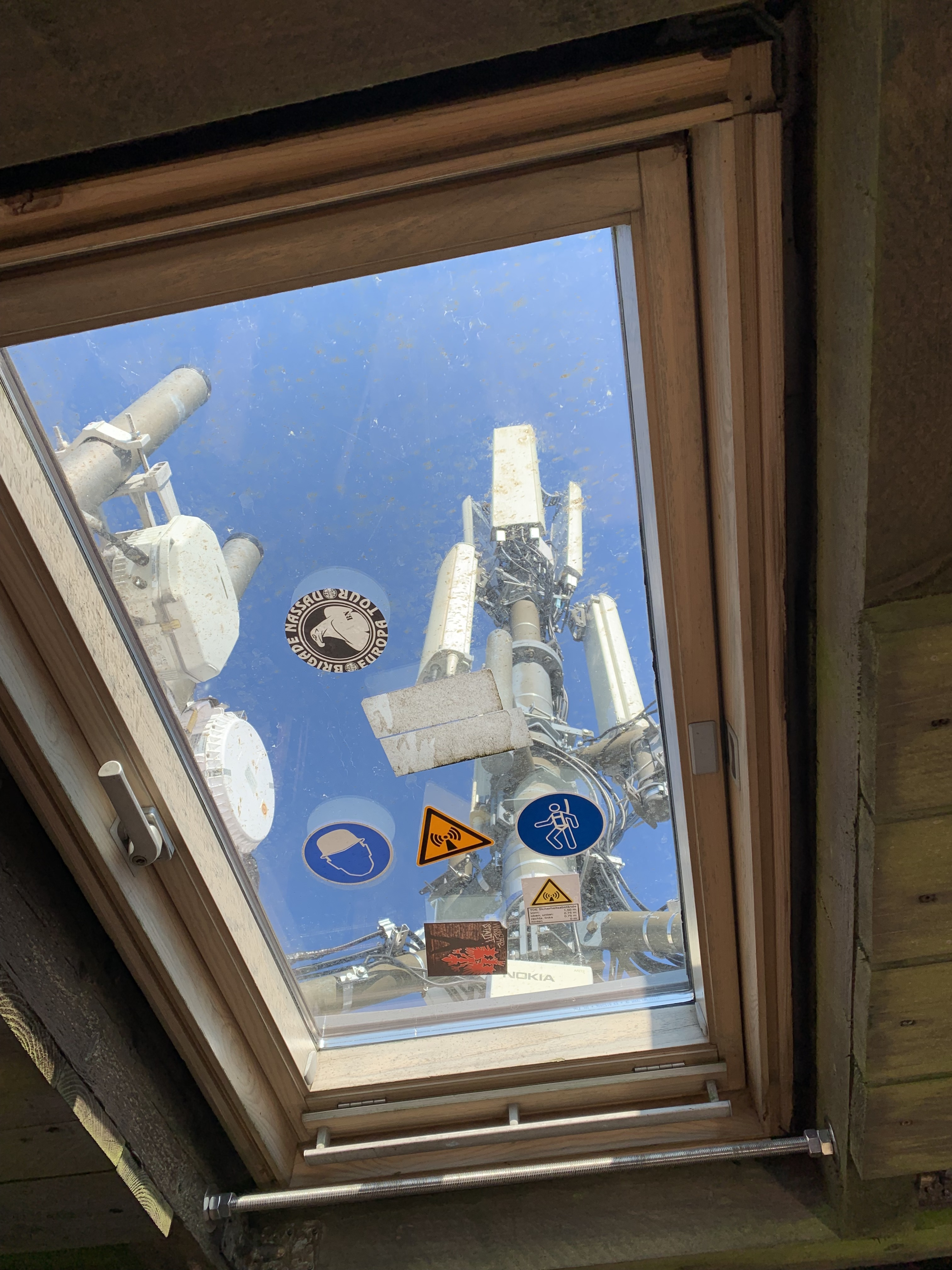 Mobilfunkantennen auf dem Pferdskopf von Telefónica Deutschland für GSM, UMTS und LTE